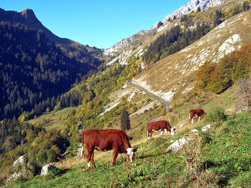 Route d'accès au col de Colombière